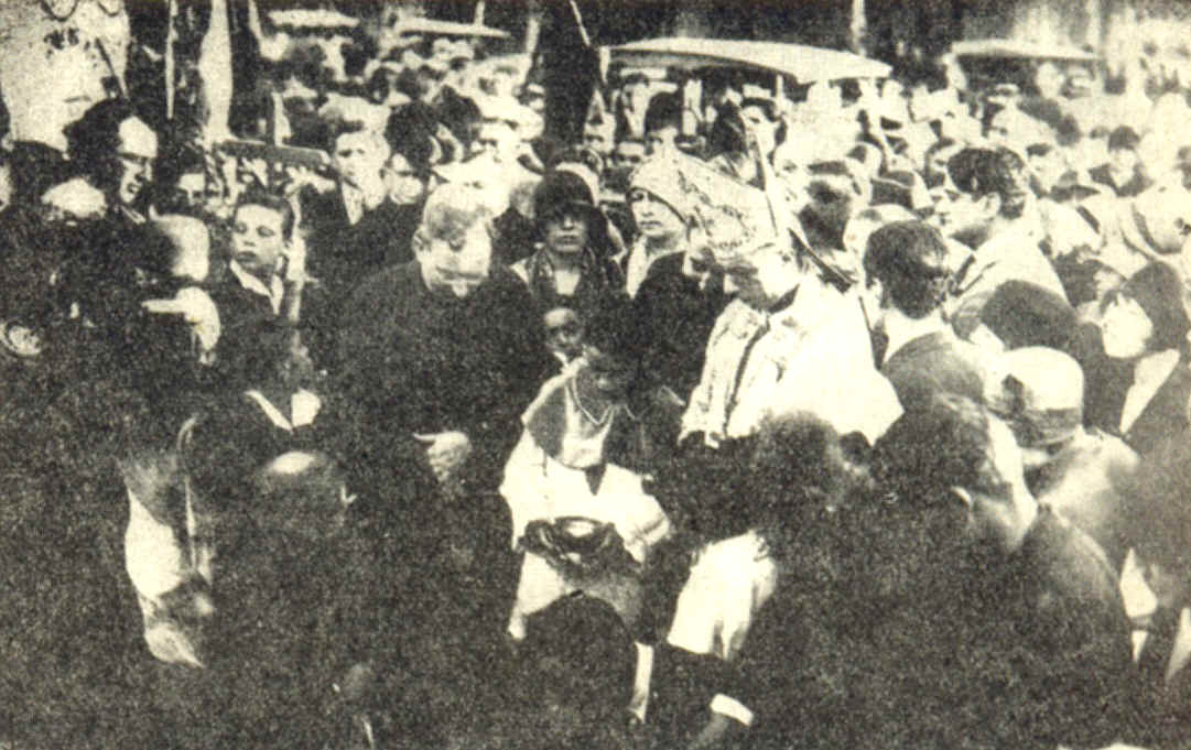 El arzobispo Fermín Lafitte.